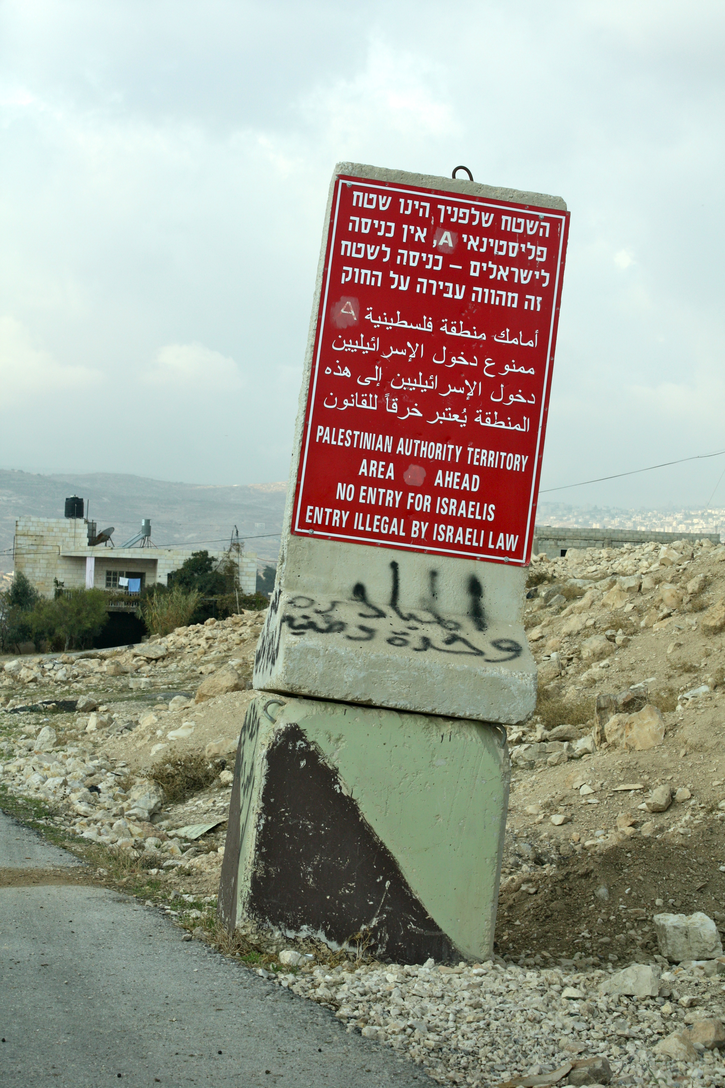 Palestine - Bethlehem - 03-2